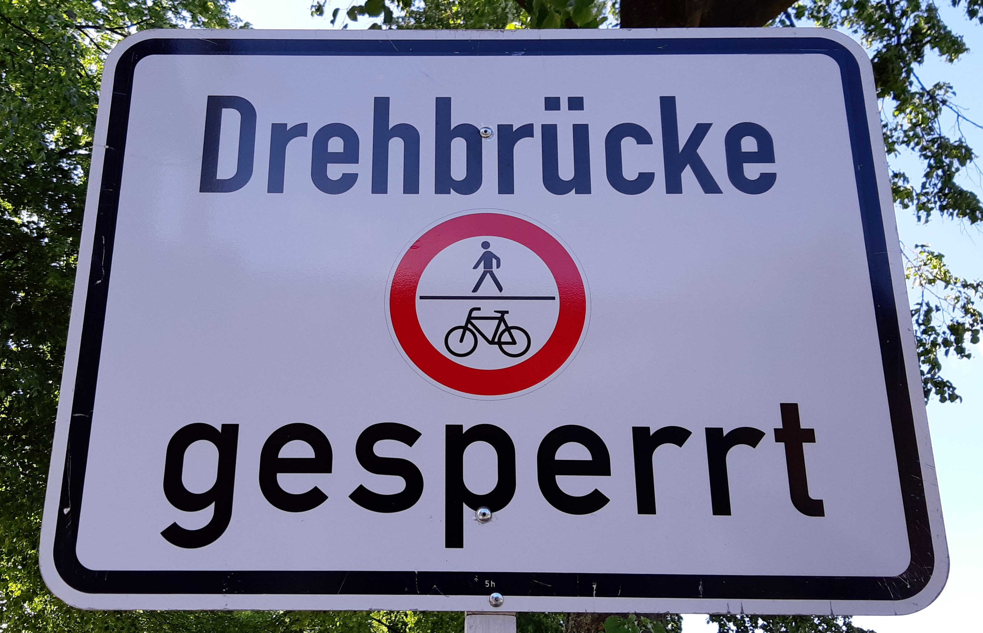 Wegen Sperrung der Drehbrücke und beginnender Sackgasse, auch für Fußgänger und Radfahrer, frühzeitiger Hinweis über die Sperrung auf dem Rad- / Fußweg